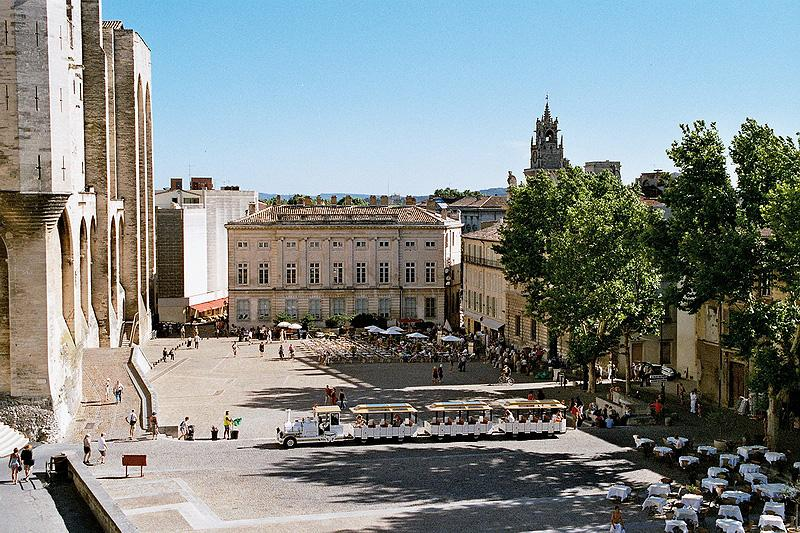 Avignon, place devant le palais des papes.